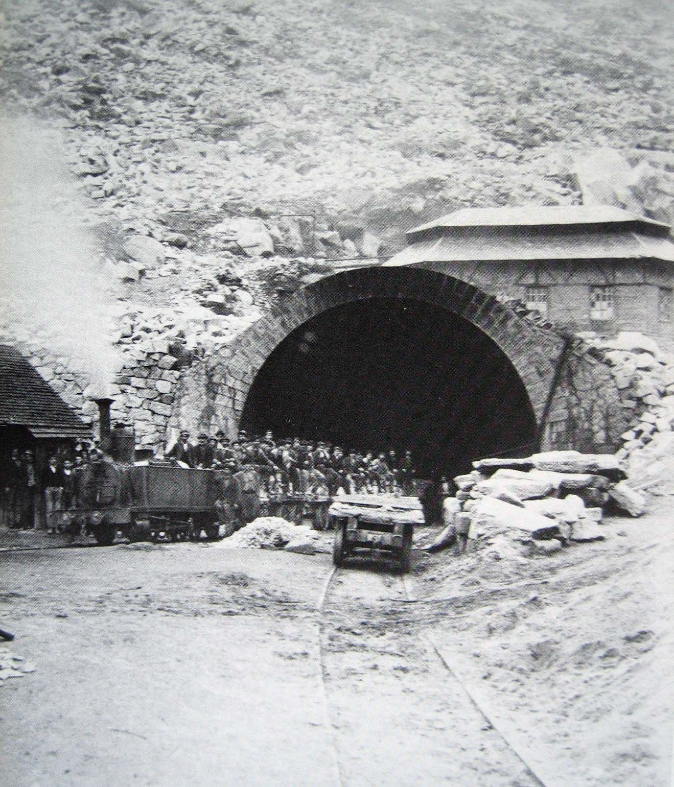 Bauzug um 1875 vor dem Tunnelportal in Göschenen